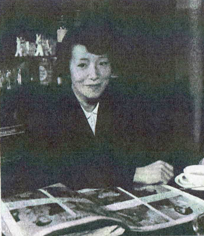 読売新聞社『家庭よみうり』358号（1953年）より阿部（三宅）艶子